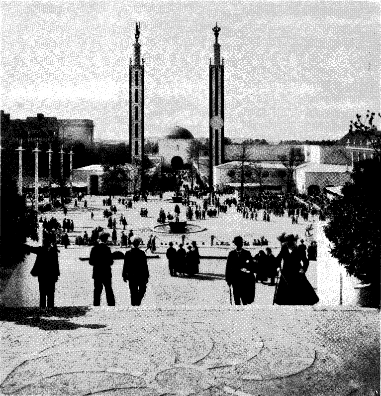 Stora gården vid Göteborgsutställningen 1923 från en bild i Svenska dagbladets årsbok 1923 tillgänglig via projekt Runeberg. Bildtext: "Från Göteborgsutställningen: utsikt över Stora gården från Minneshallen."